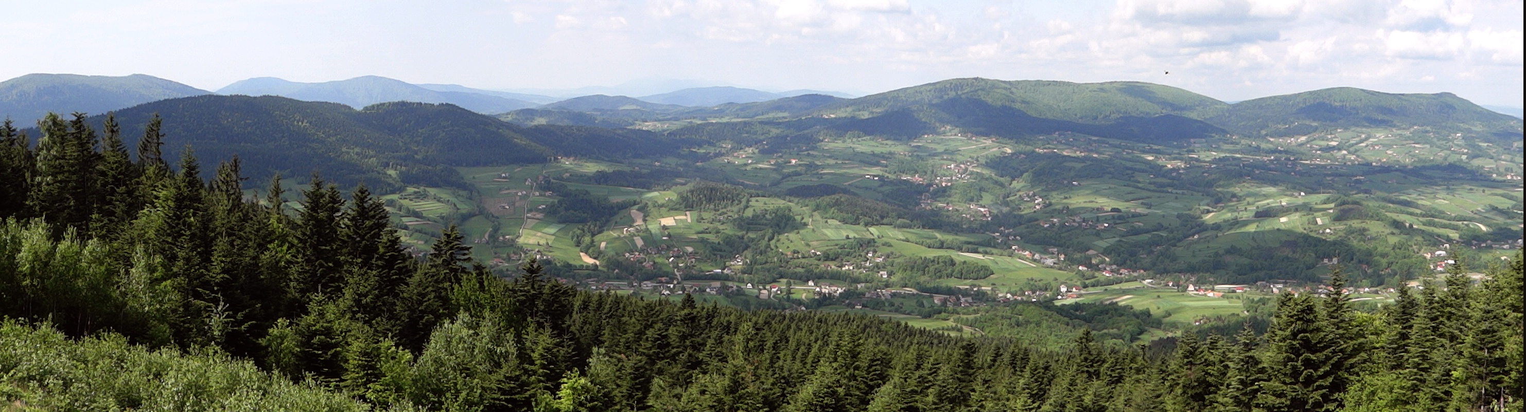 Panorama z polanki paralotniarzy na Ciecieniu